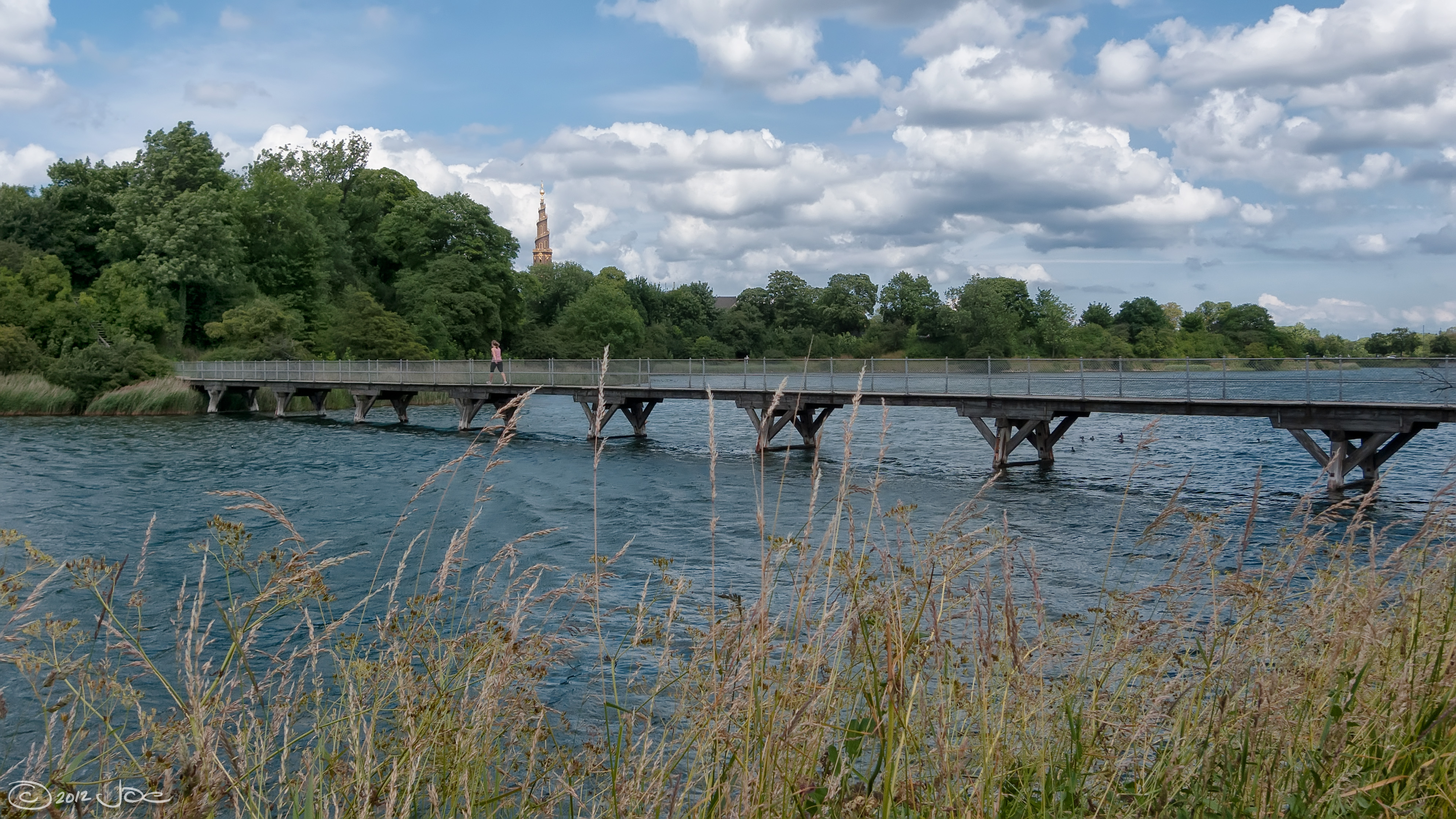 Dyssebroen at Stadsgraven in Copenhagen, Denmark